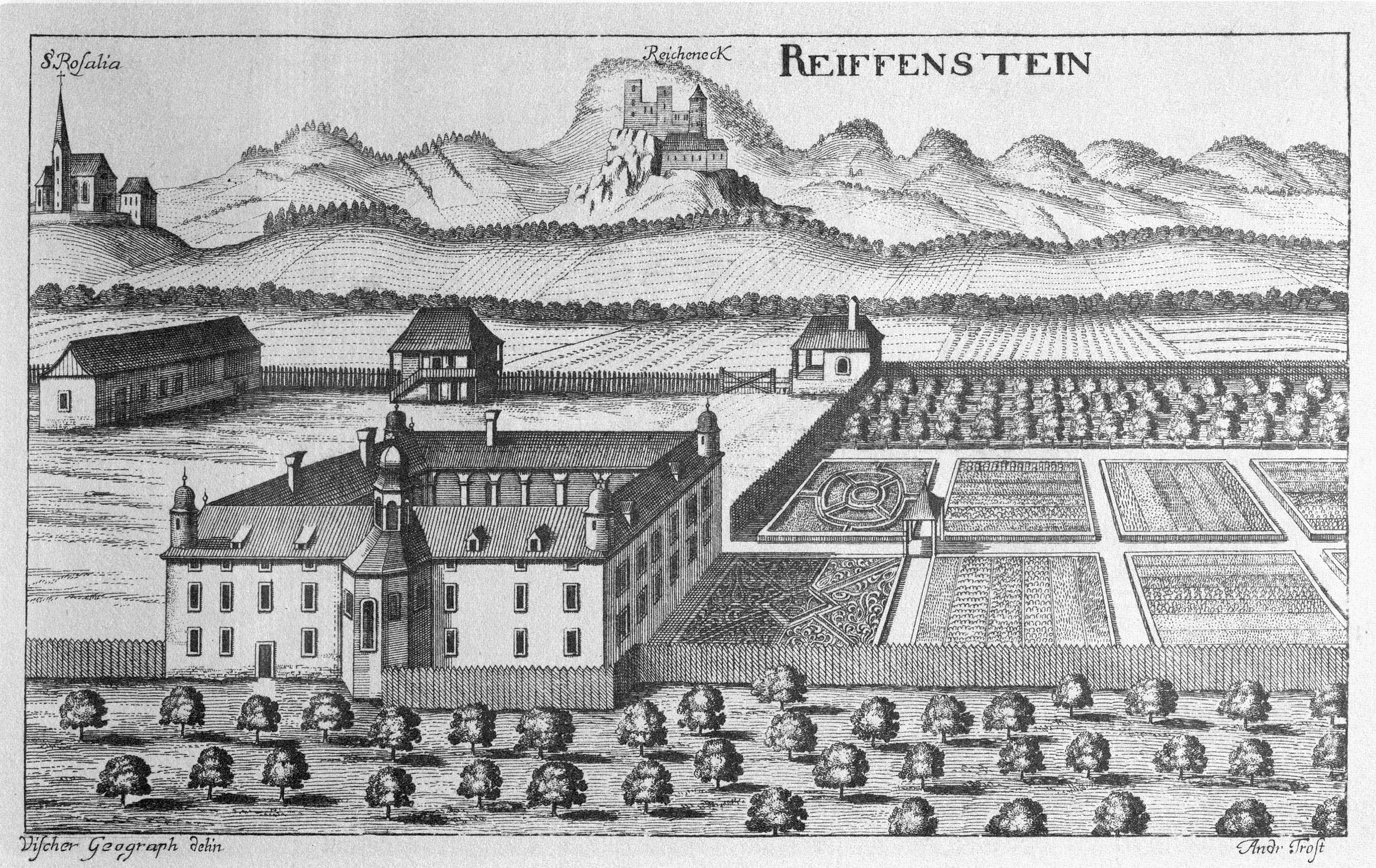 G. M. Vischers Käyserlichen Geographi, Topographia Ducatus Stiriae, Das ist: Eigentliche Delineation / und Abbildung aller Städte / Schlösser / Marcktfleck / Lustgärten / Probsteyen / Stiffter / Clöster und Kirchen / so es sich im Herzogthumb Steyrmarck befinden; Und anjetzo Umb einen billichen Preyß zu finden seynd Bey Johann Bitsch Universitäts Buchhandlern / Auff dem Juden=Platz bey der guldenen Saulen. Graz 1681 Die Nummerierung der Dateien folgt der alphabetischen Reihung der Ortsnamen und entspricht nicht dem Vischer-Register